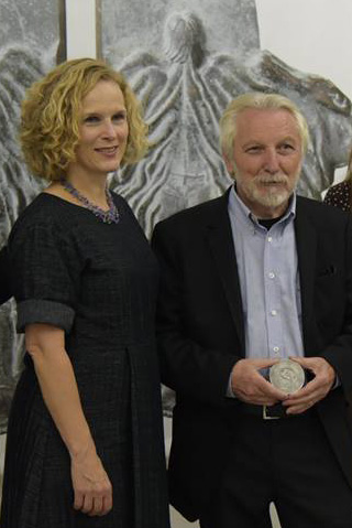 Проф. Богомил Николов с наградата САЛТУС в галерия „Академия“, 2018 г.